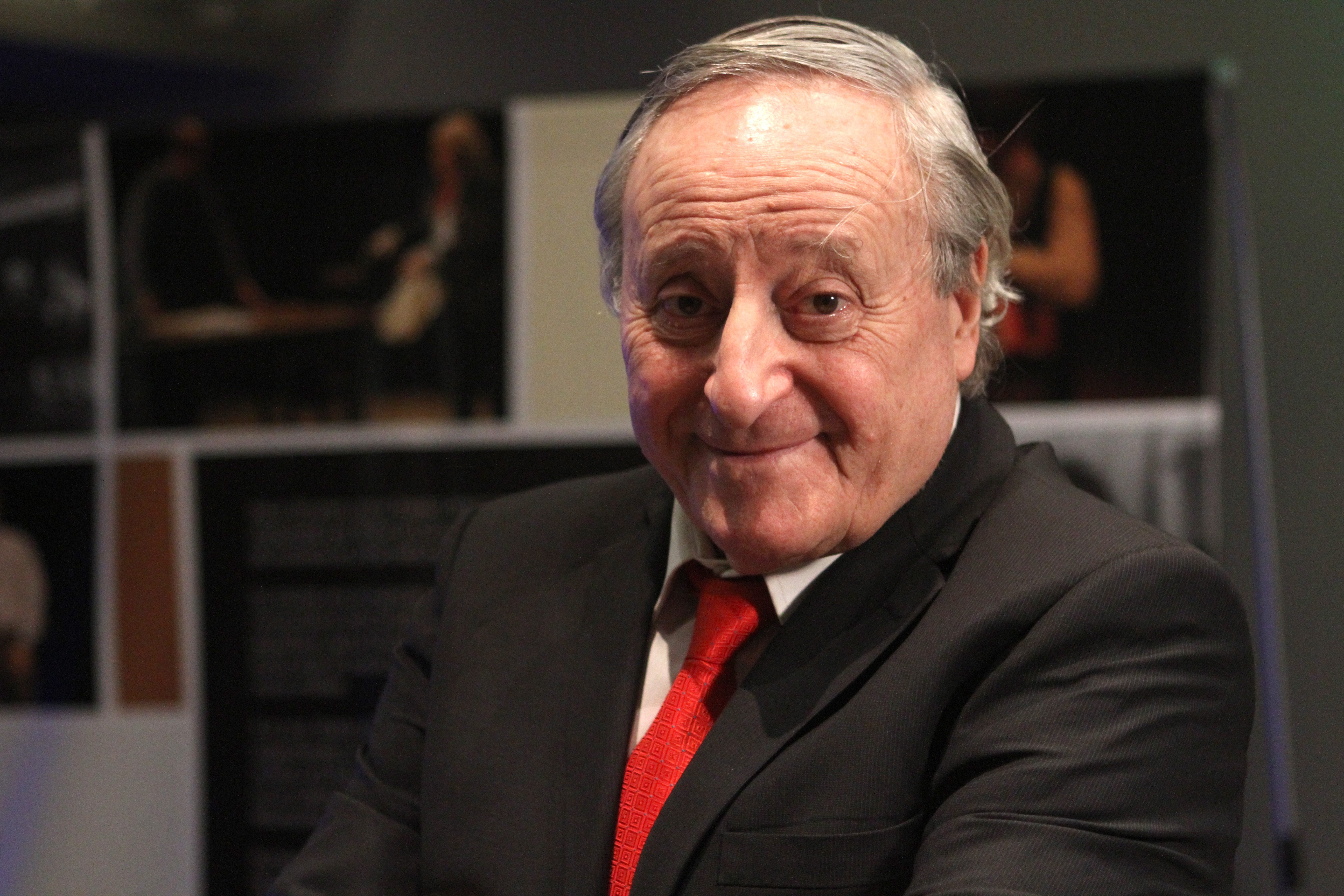 Argentine actor Roberto Carnaghi. Photo: Silvina Frydlewsky / Ministerio de Cultura de la Nación